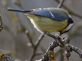 Blaumeise bei der Futteraufnahme